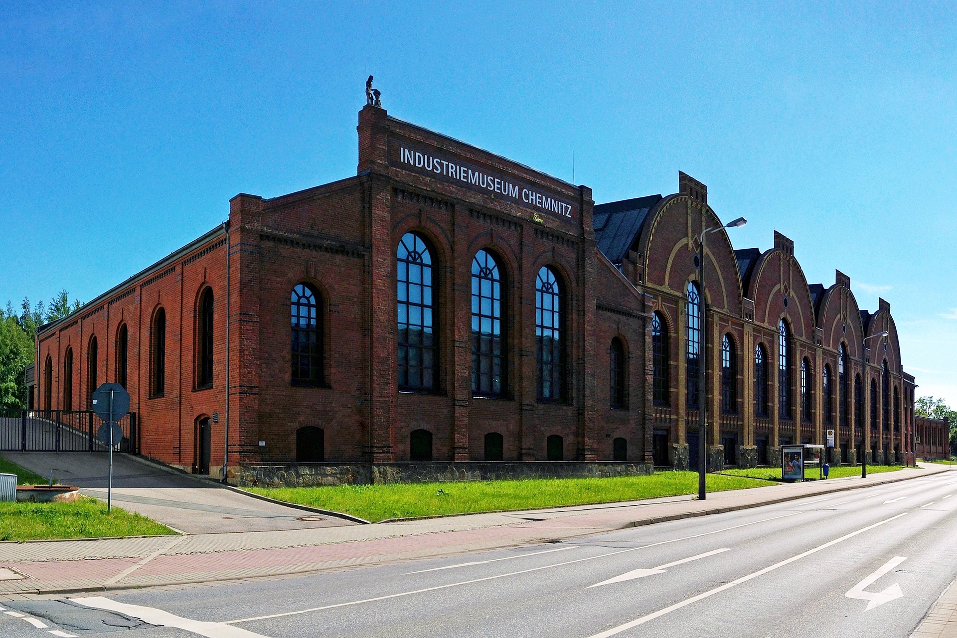 Das Sächsische Industriemuseum Chemnitz an der Zwickauer Straße in Chemnitz im Jahr 2016.